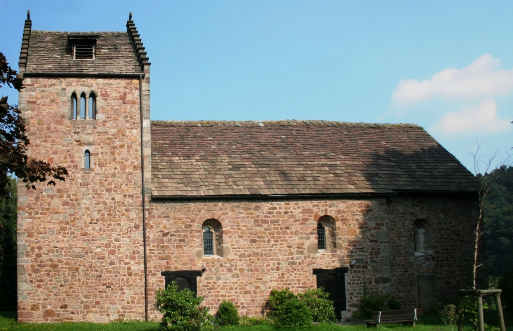 Evangelische Kirche in Vaake, GFDL, selbst fotografiert. Kategorie:Bild:Kirche